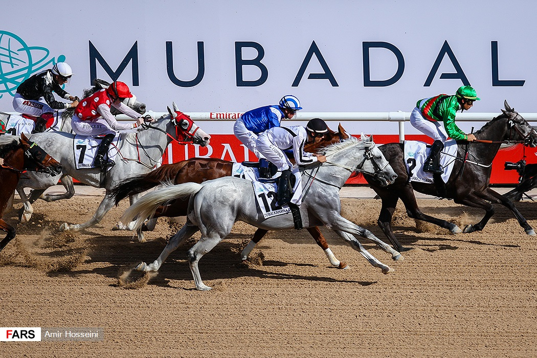 جام جهانی اسب‌دوانی ۲۰۱۹ - دبی